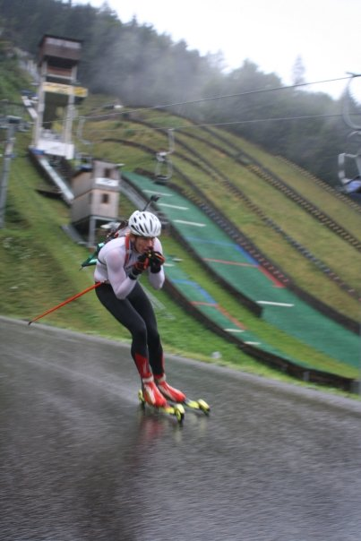 See Title